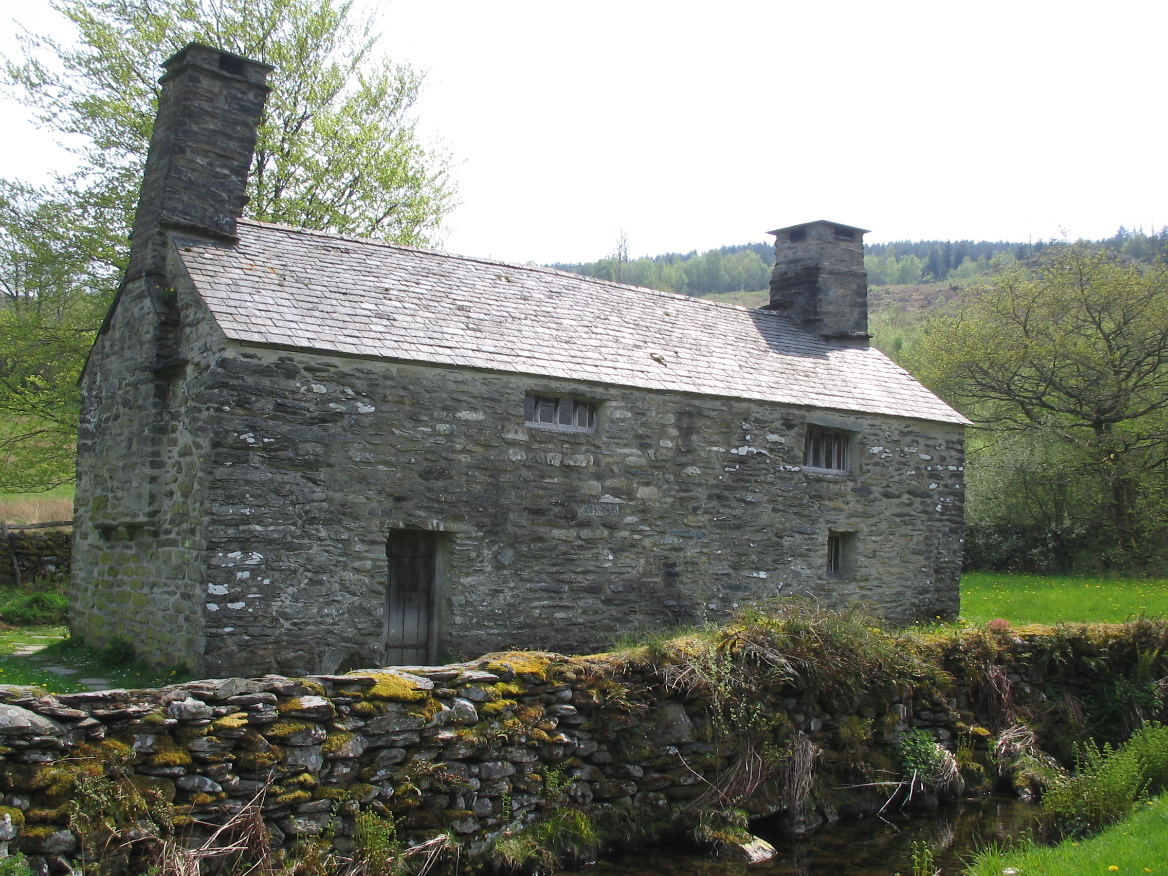 Ty Mawr, Wybrnant, nr Betws y Coed, Wales